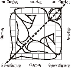 வாஸ்து புருஷ மண்டலம்